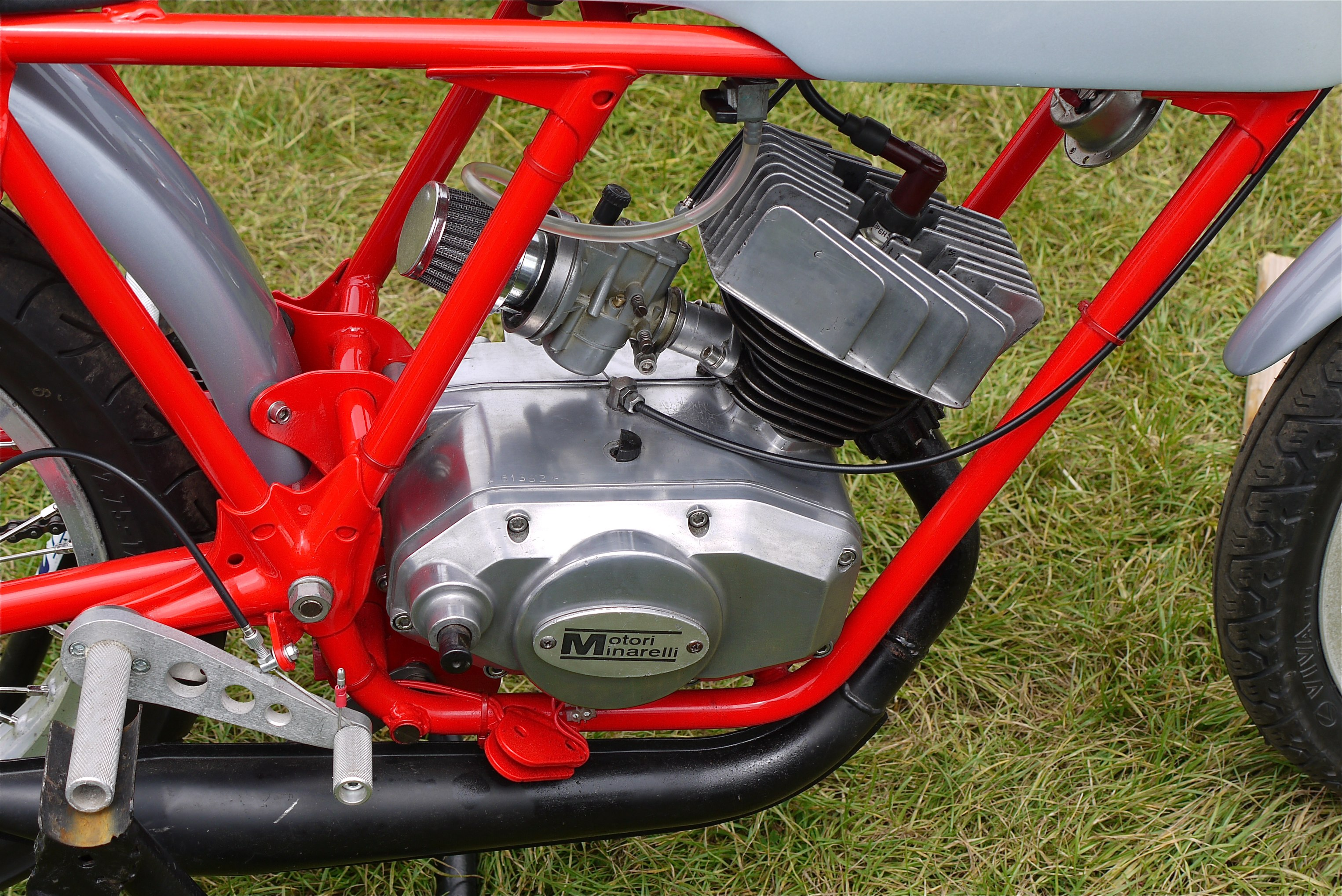 Panasonic G1 14-45 Lens